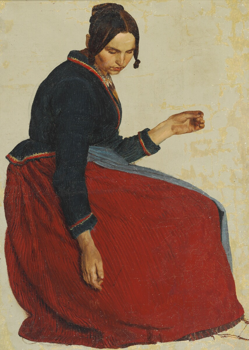 Lorenz Frølich: “Portræt af en kvinde med rød nederdel”. 1848. Usigneret. Olie på lærred. 40×29 cm